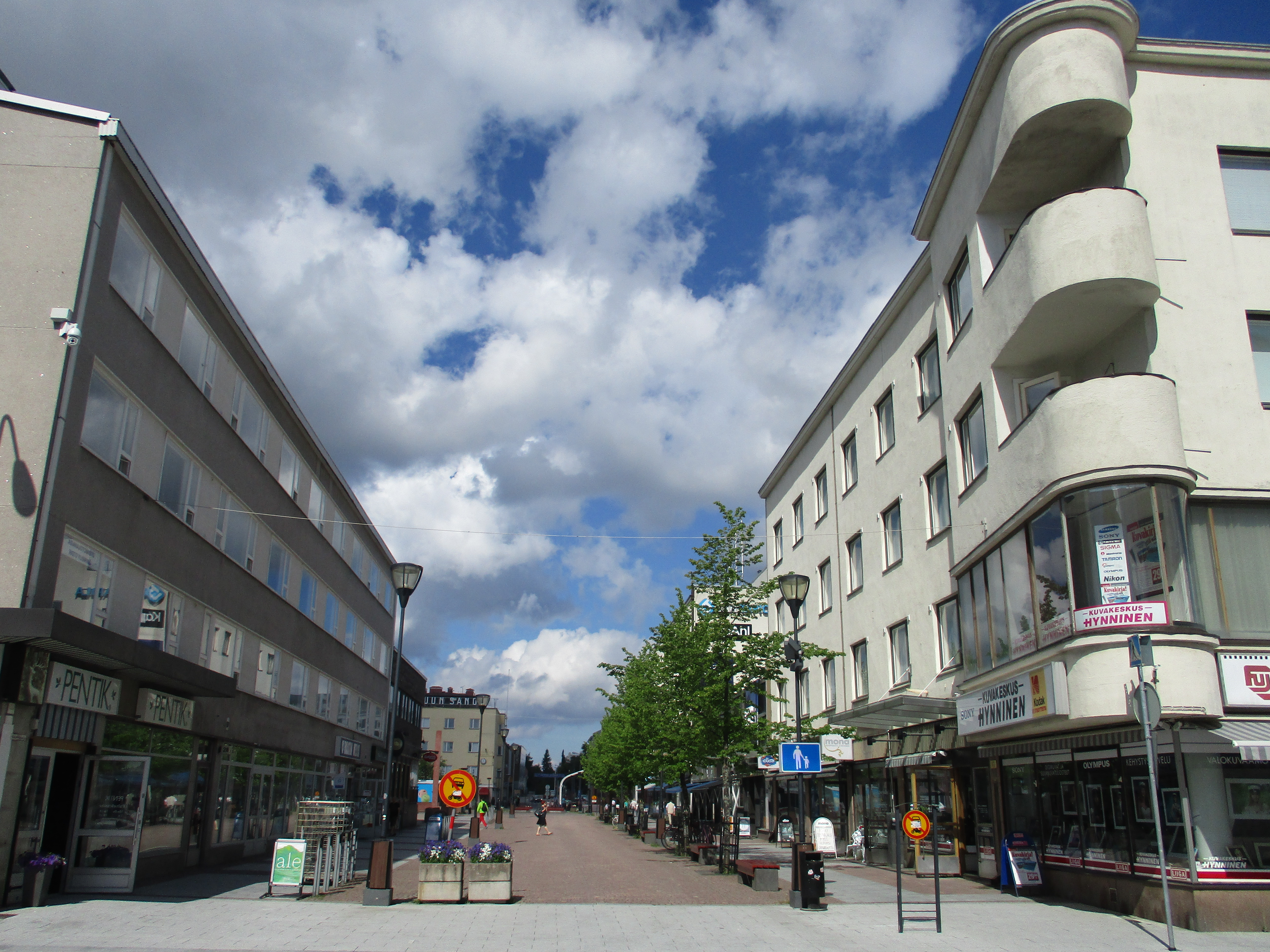 Kajaanin Kauppakadun funkistalot ja Raatihuoneentori; kaupunkiympäristö Kajaanissa